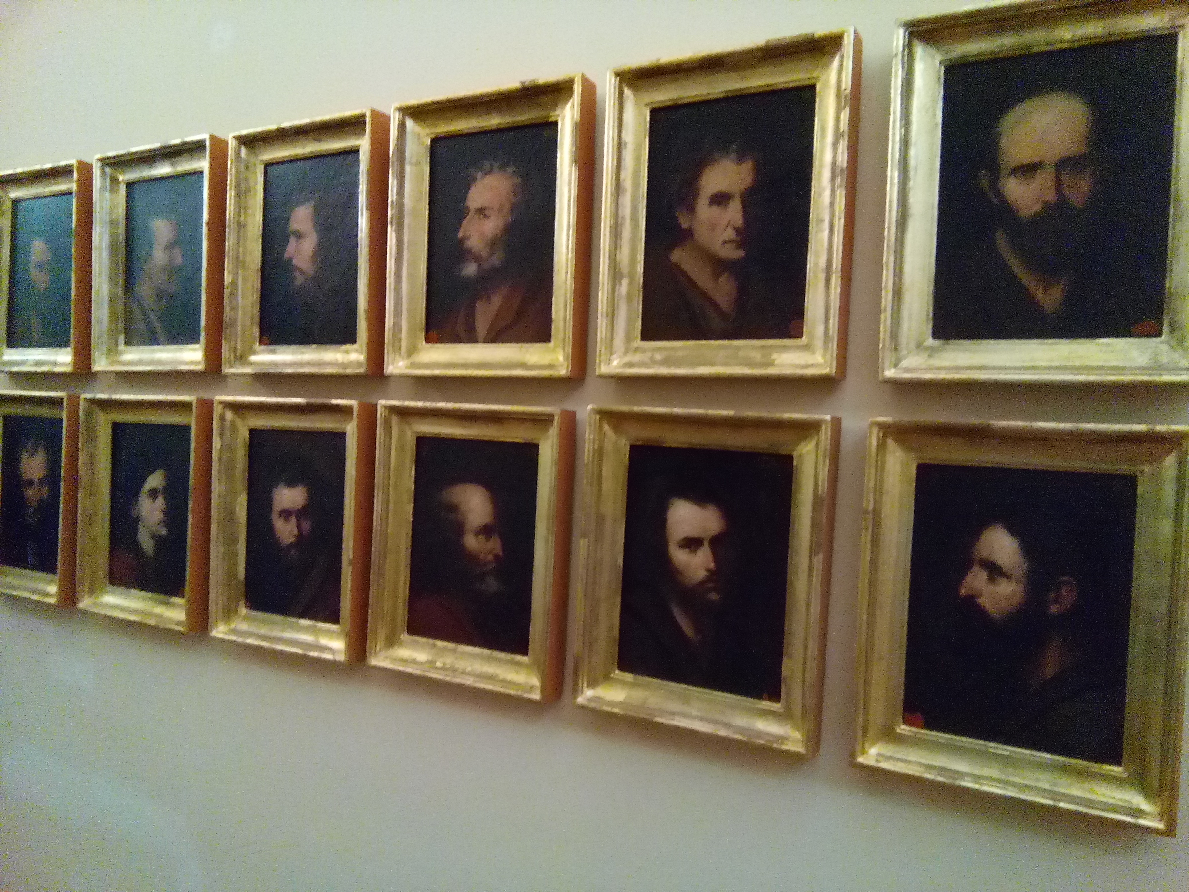 I Dodici apostoli, di Geronimo Gerardi - Museo Regionale Conte Agostino Pepoli (Trapani)